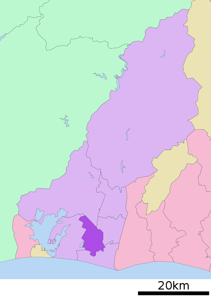 Location Map of Naka-ku, Hamamatsu